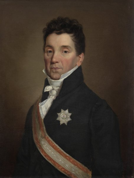 Bildnis Niklaus von Wattenwyl (1760 - 1832), Schultheiss von Bern.